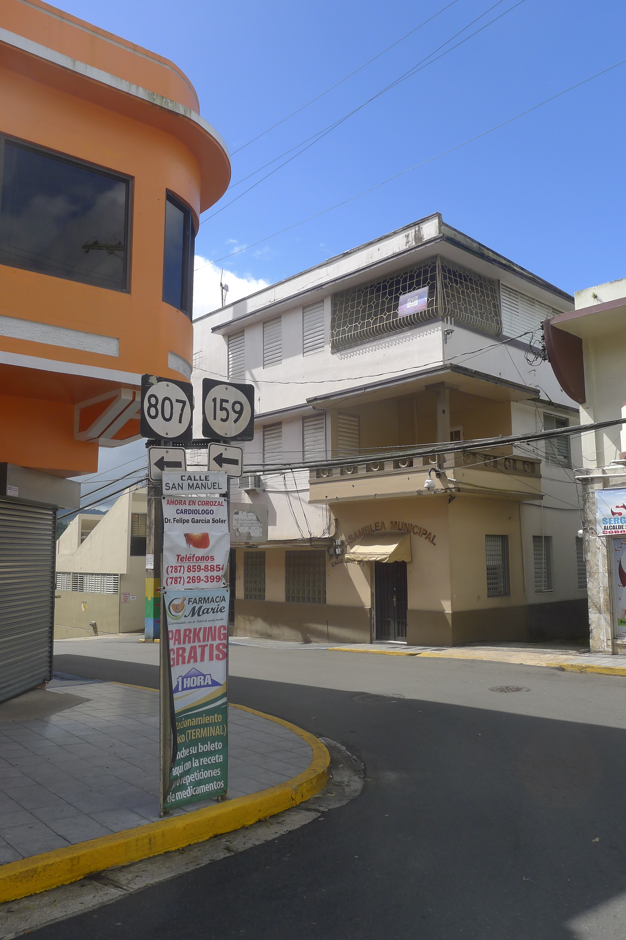 Corozal, 00783, Puerto Rico